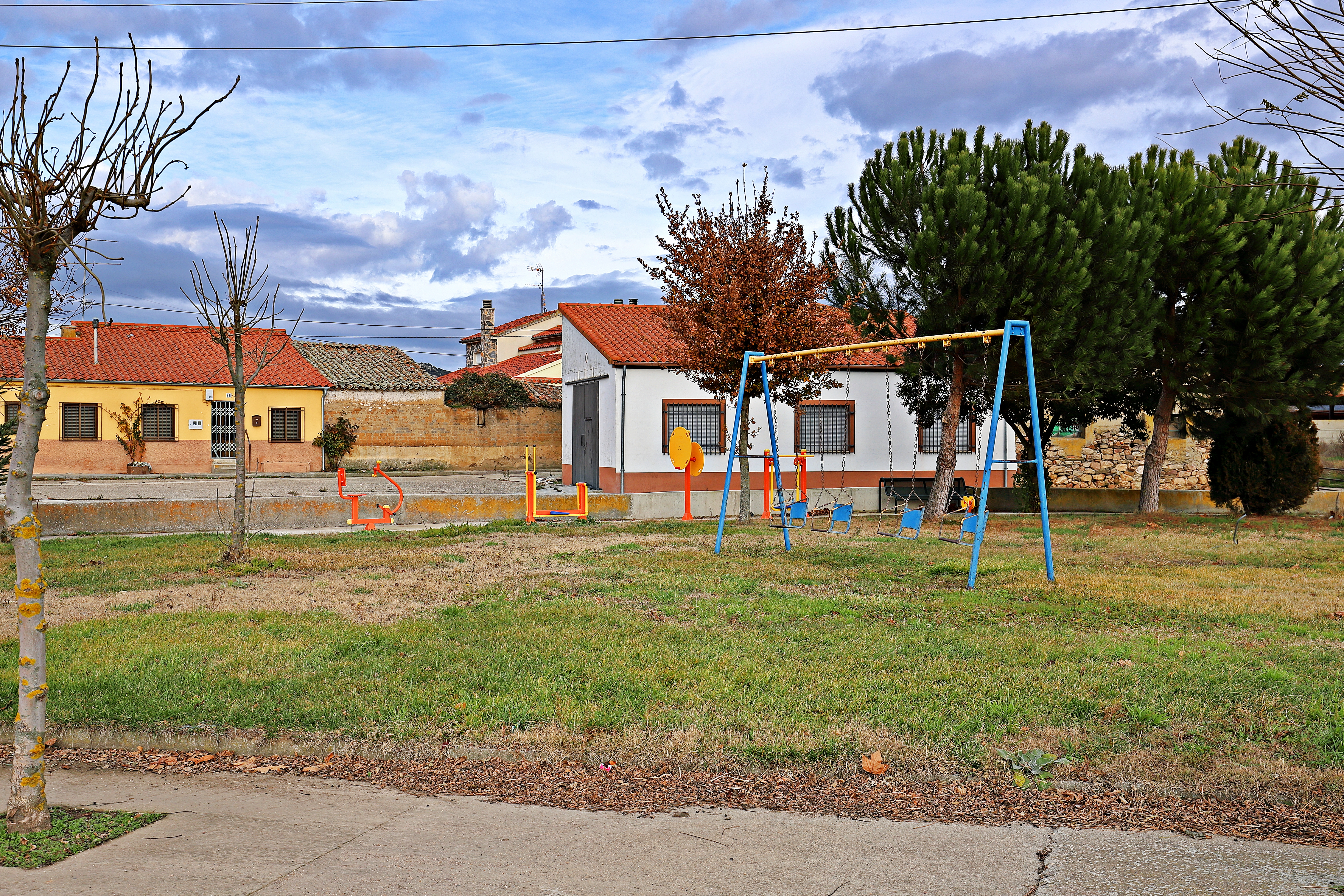 Encinas de Arriba municipio de la comarca Tierra de Alba, en la provincia de Salamanca.